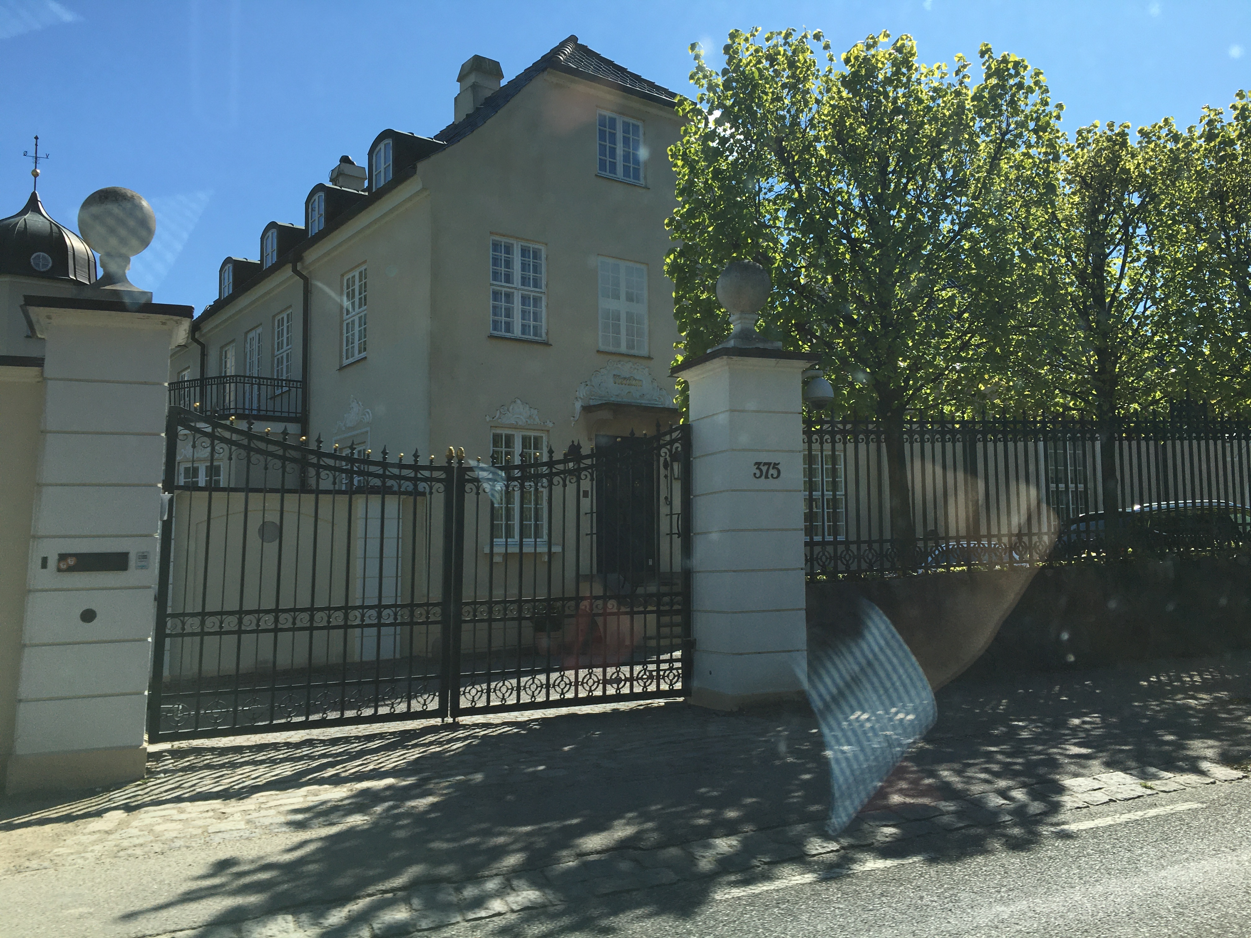 Tusculum set fra Nybrovej